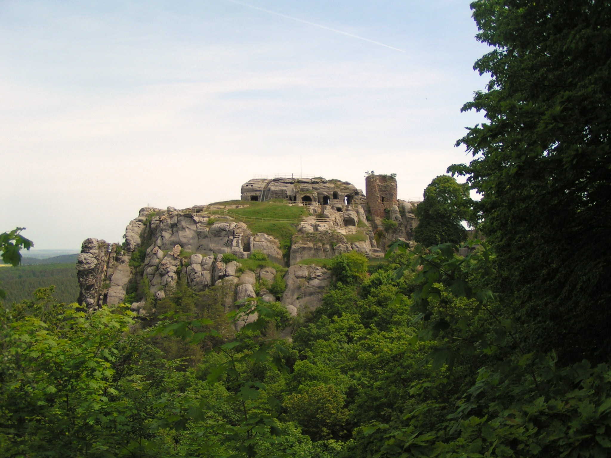 Blick von der Scharfen Ecke auf die Burg Regenstein.